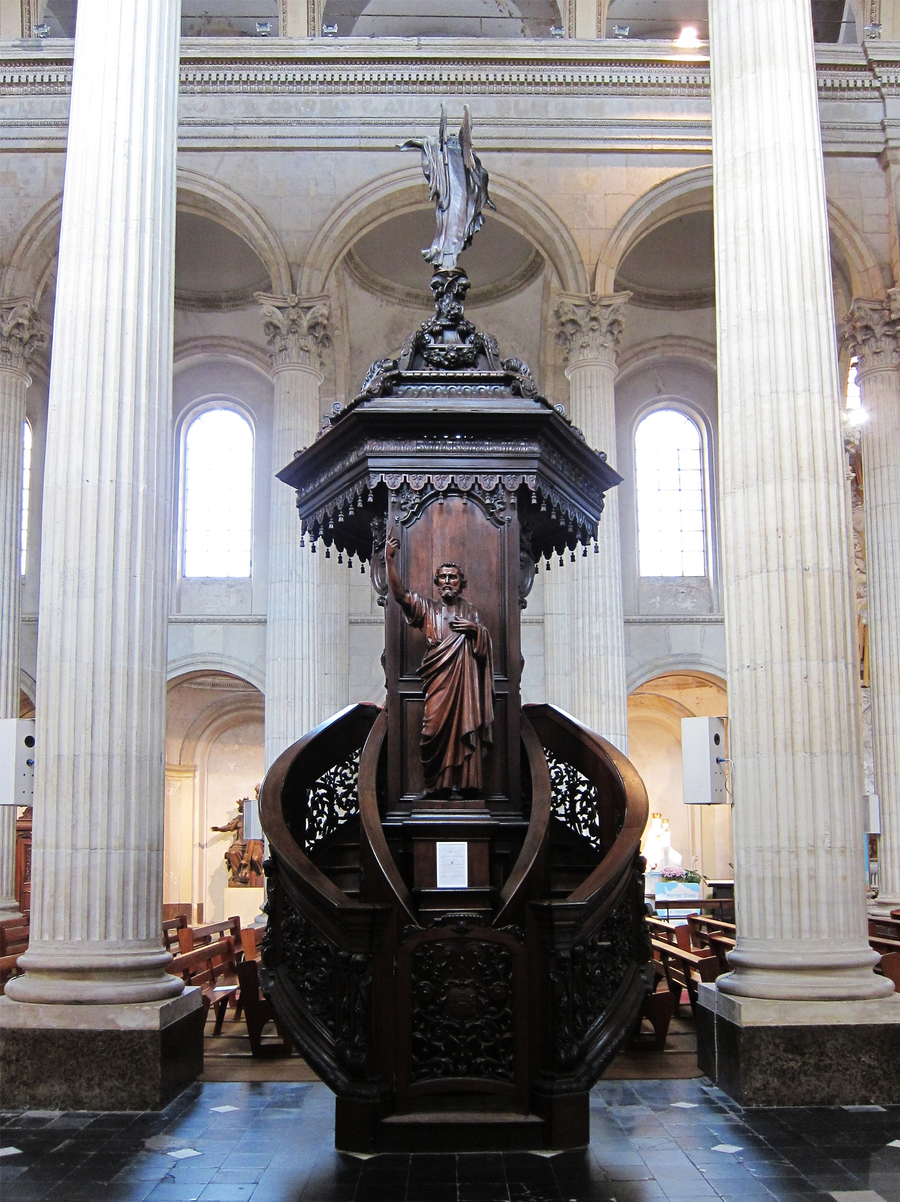 La chaire de la cathédrale Notre-Dame de Boulogne-sur-Mer, exécutée par Charles Buisine-Rigot en 1869.